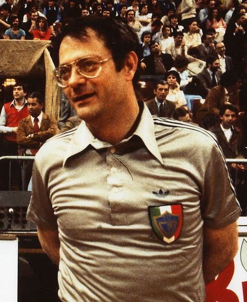 Maurizio Martolini